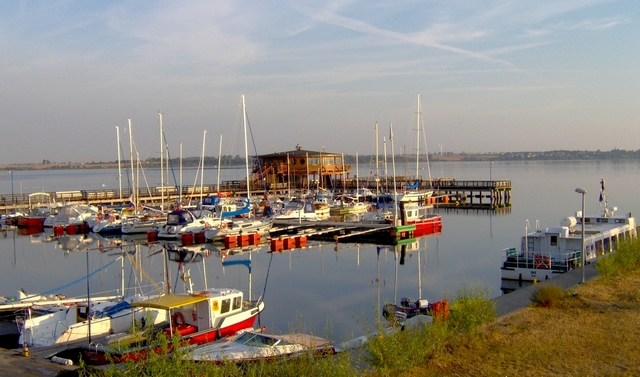 marina, Puck, Poland Autor: Krzysztof